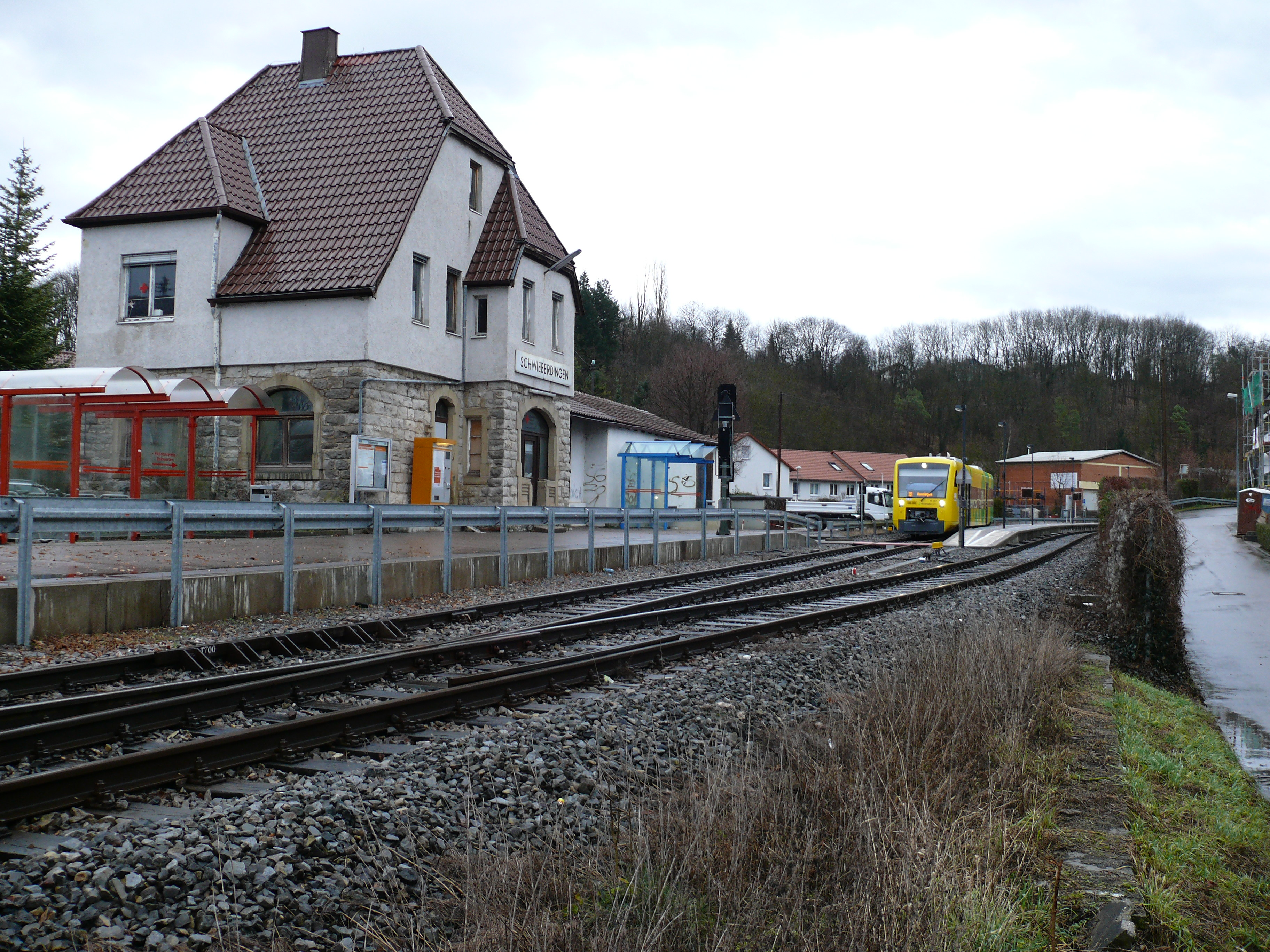 Der Haltepunkt Schwieberdingen entlang der Strohgäubahn, mit abfahrbereitem RS1-Triebwagen in neuer Lackierung.